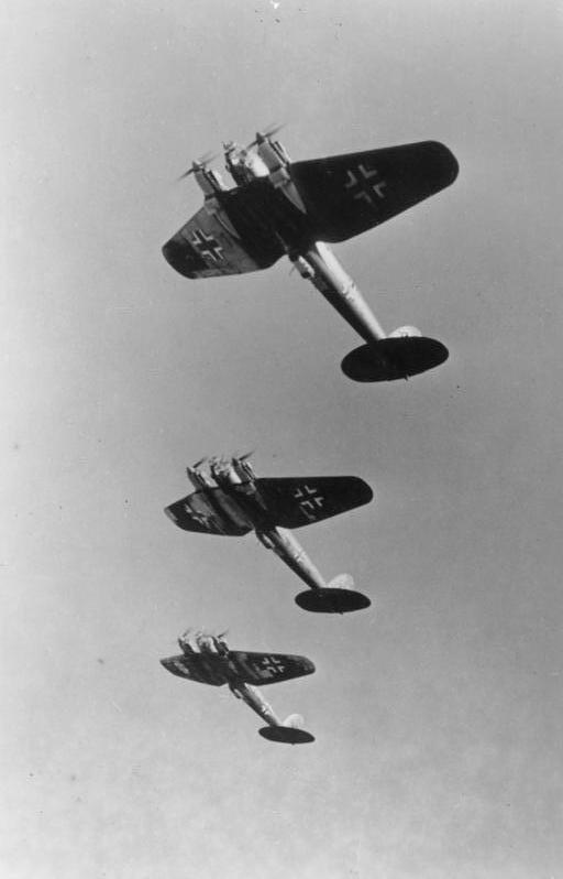 Eine Kette Kampfflugzeuge vom Typ He 111